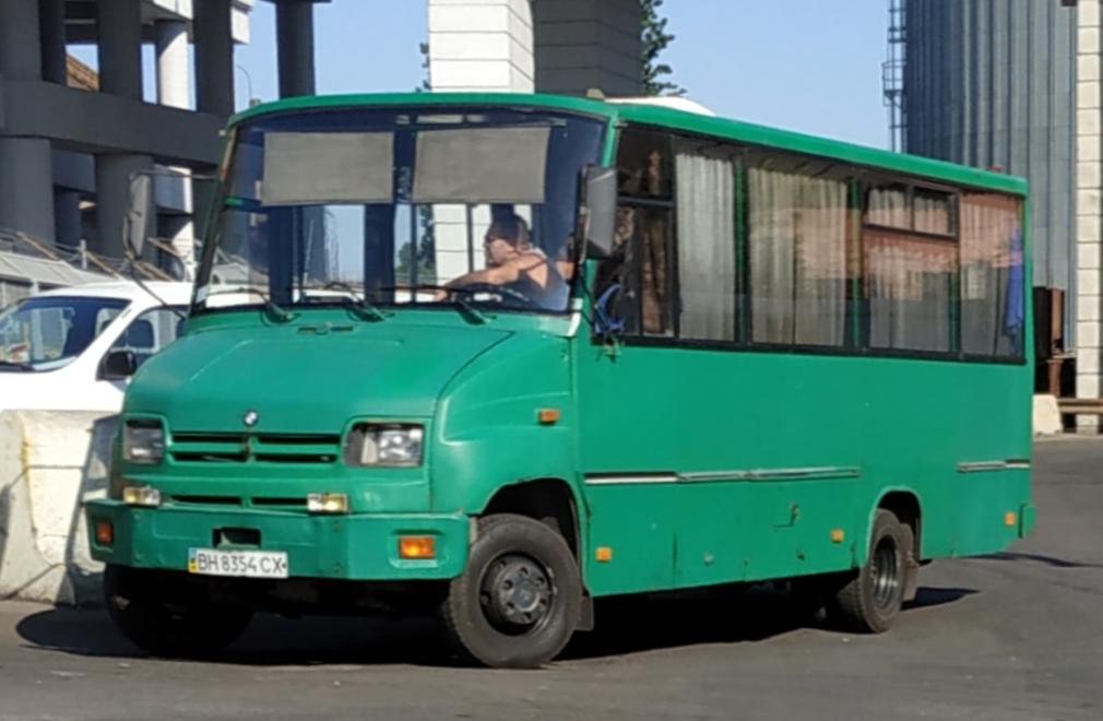 Автобус Стрый-Авто А-075, Одесса, 2019 г.